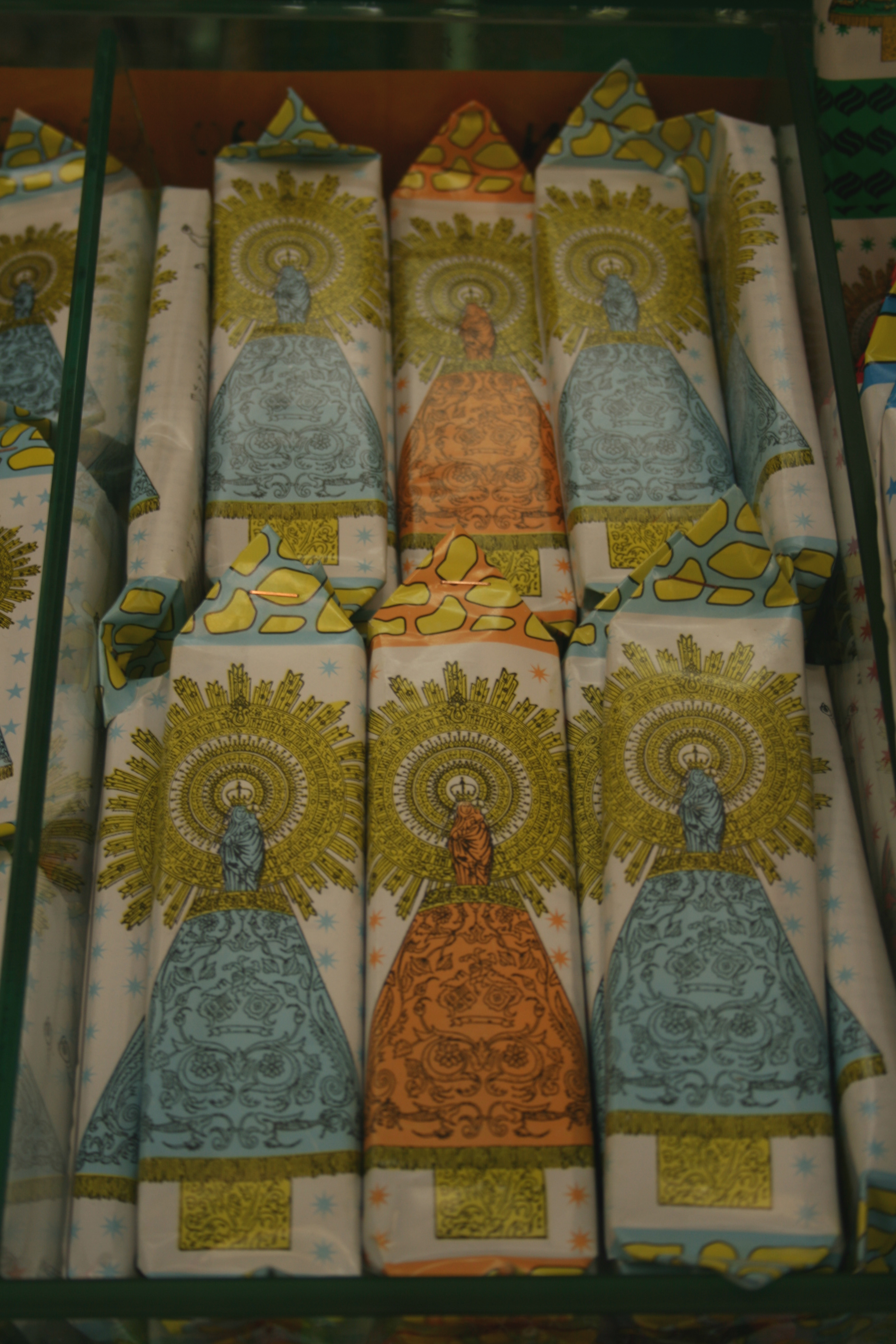 Adoquines - caramelos típicos de aragón